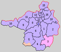 京都府南桑田郡の町村制時点の町村。